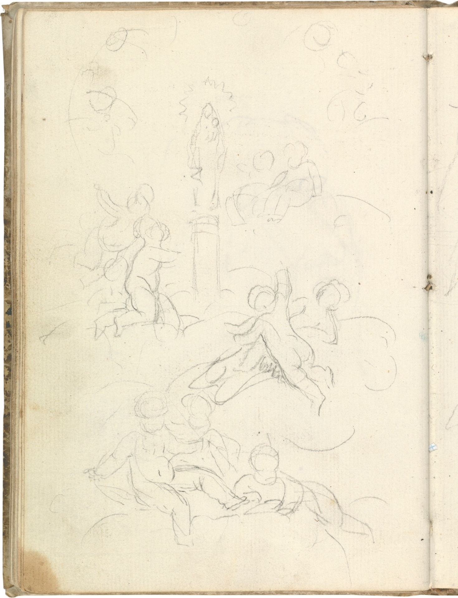 Virgen del Pilar con angelitos entre nubes. Dibujo preparatorio en el Cuaderno Italiano